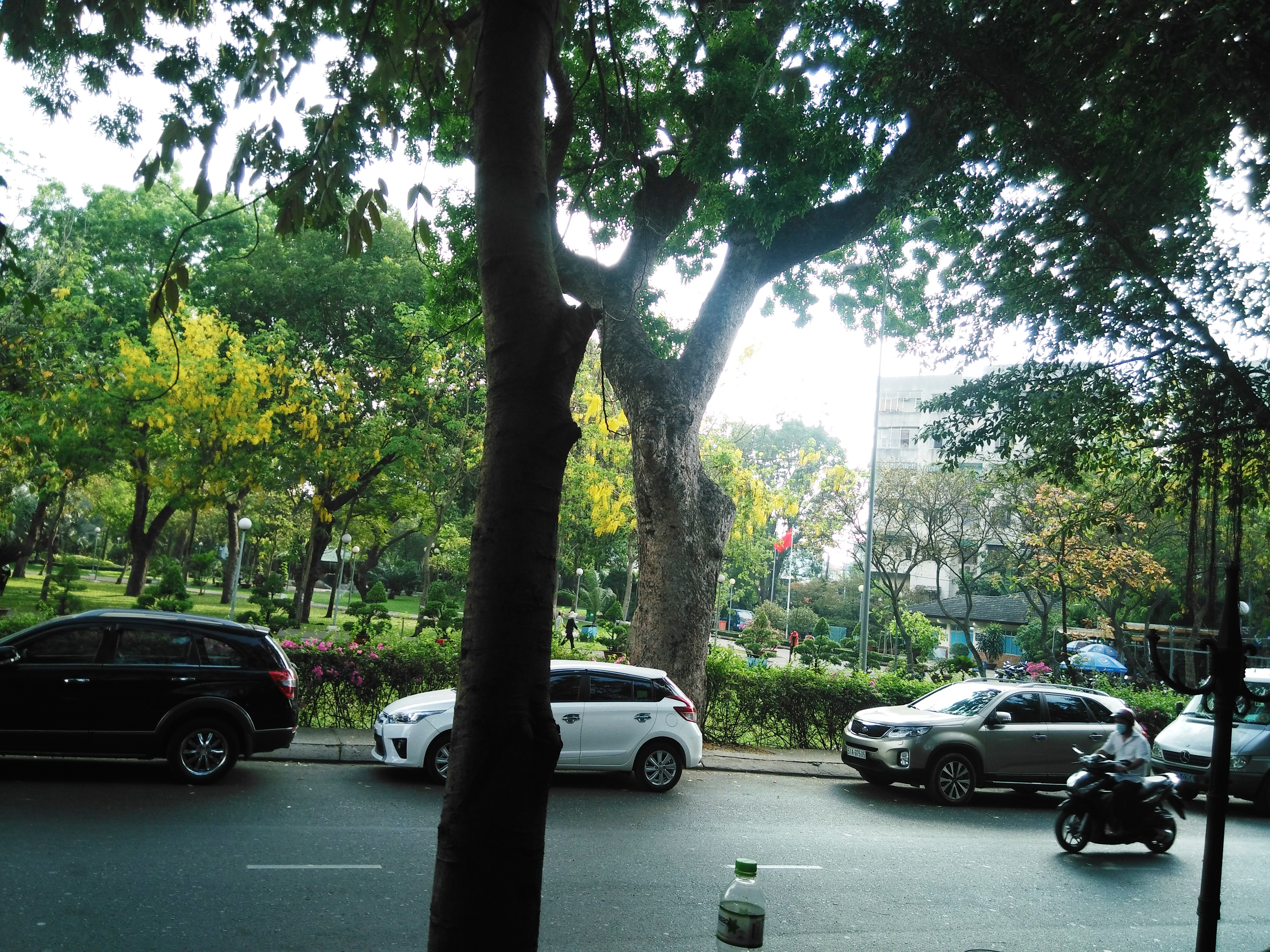 Hình tự chụp bằng di động cá nhân về công viên Gia Định